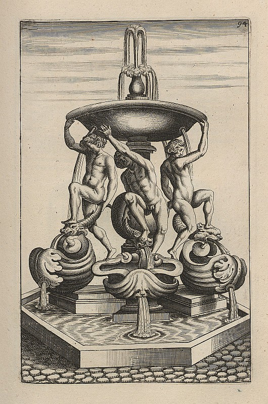 Original image description from the Deutsche Fotothek Architektur & Mechanik & Wasserförderung & Wasserkunst & Springbrunnen